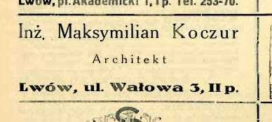 Реклама архітектора Максиміліана Кочура у часописі Zycie Techniczne, № 9, 1936.